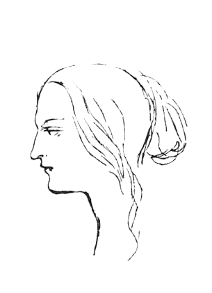 Maria_Kalergis